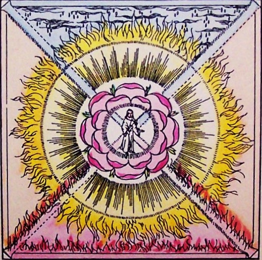 Détail de l'une des planches alchimiques publiées à Altona en 1785